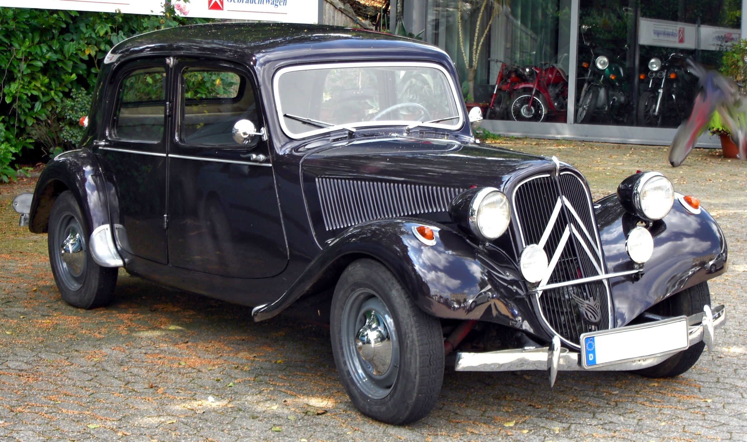 Citroën Traction Avant Légère